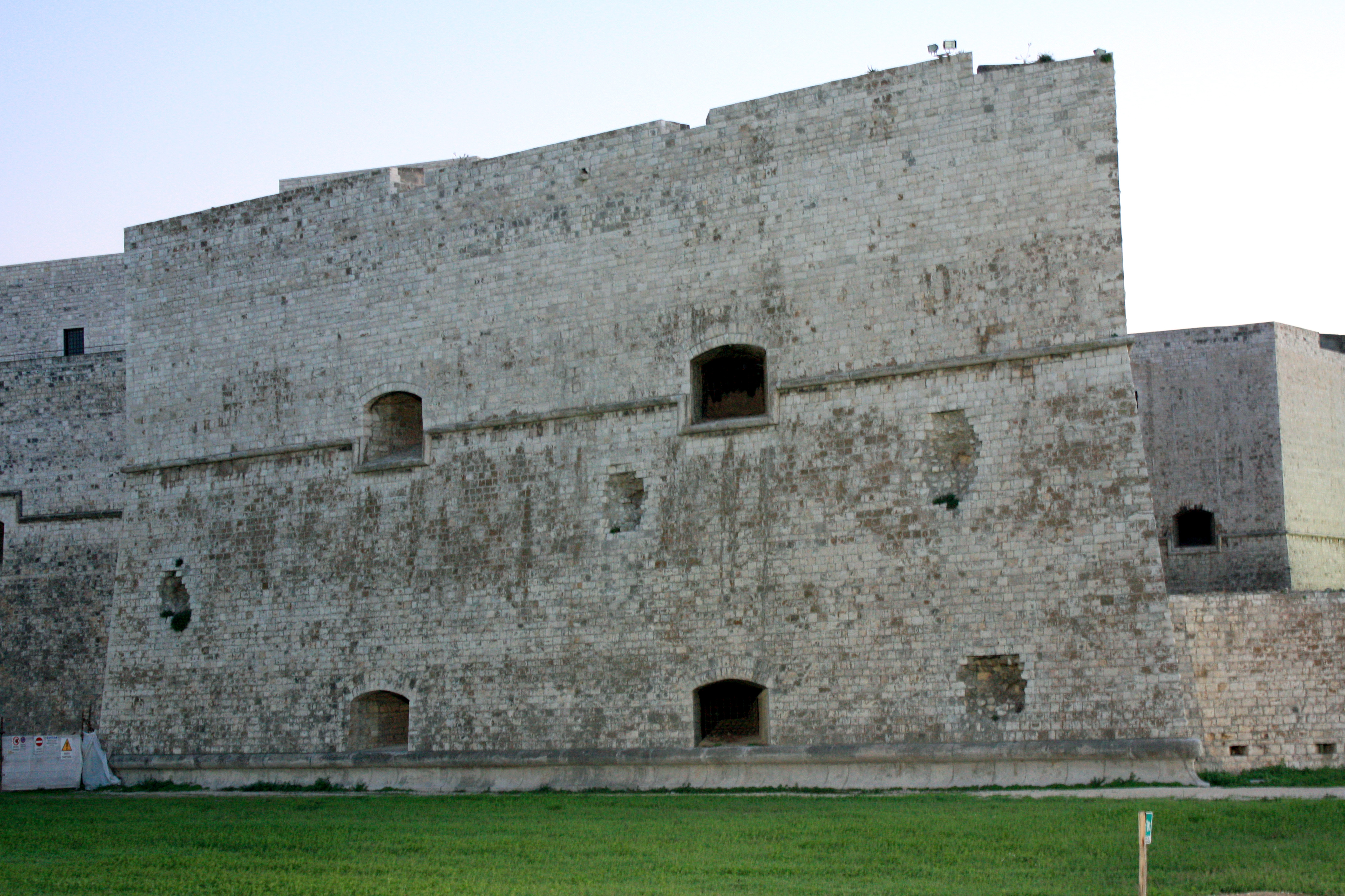 I segni dei colpi di canonne sul bastione di San Vincenzo, inflitti dall'armata austriaca durante la Seconda Guerra Mondiale